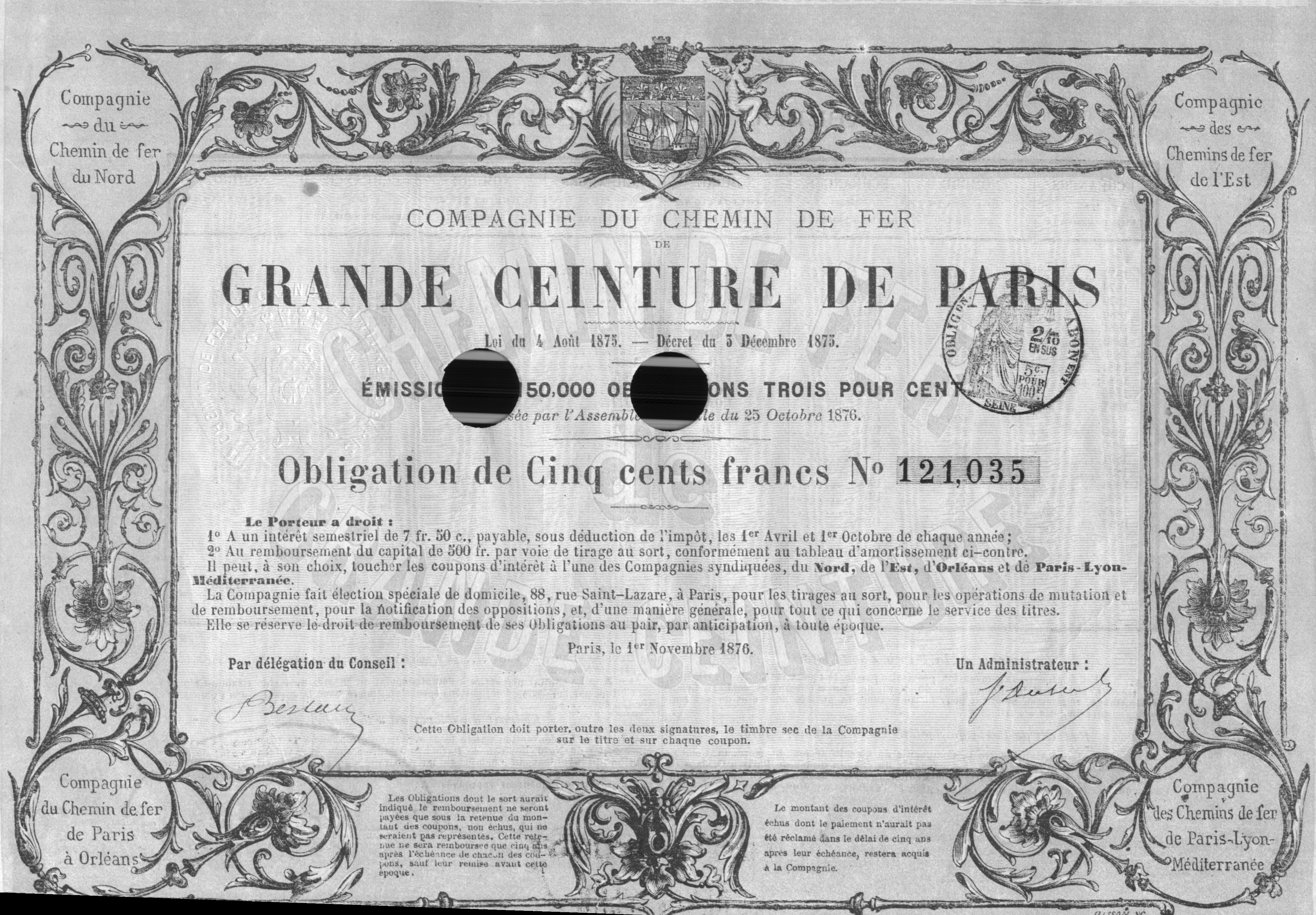 Obligation de la Compagnie de la Grande Ceinture